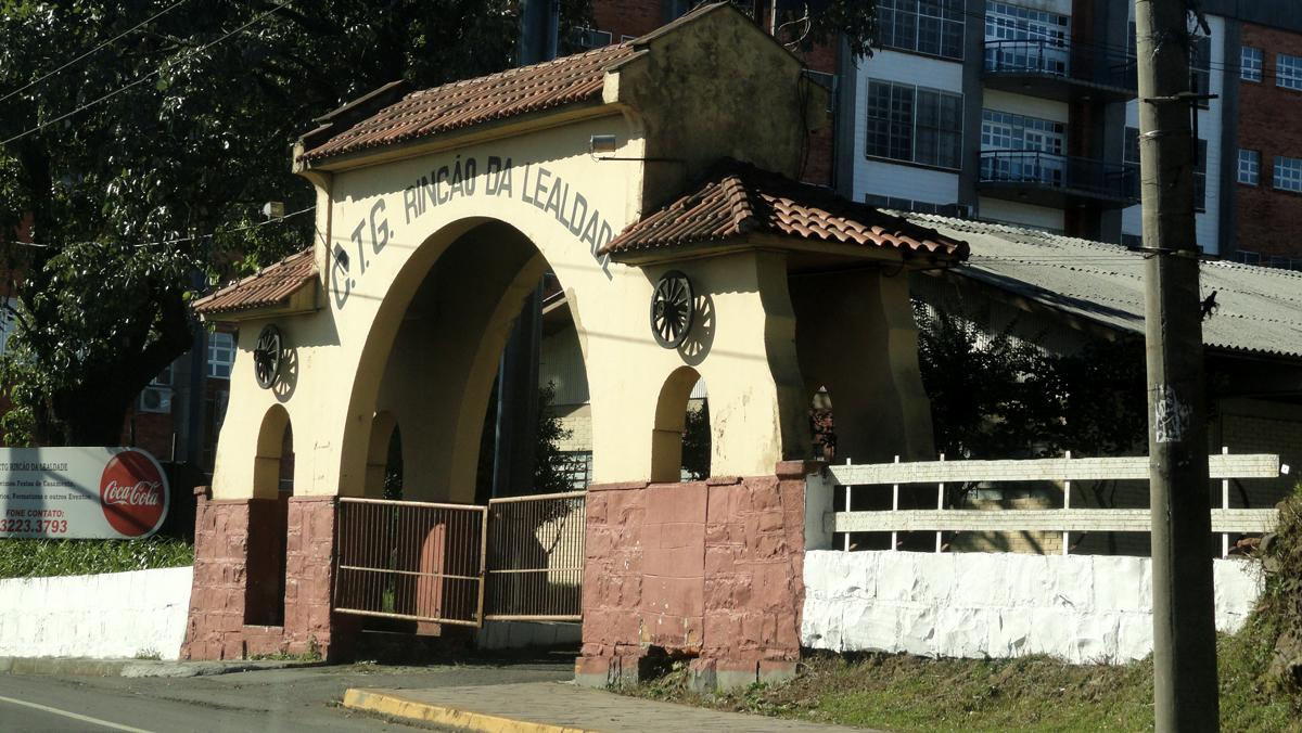 Centro de Tradições Gaúchas "Rincão da Lealdade"